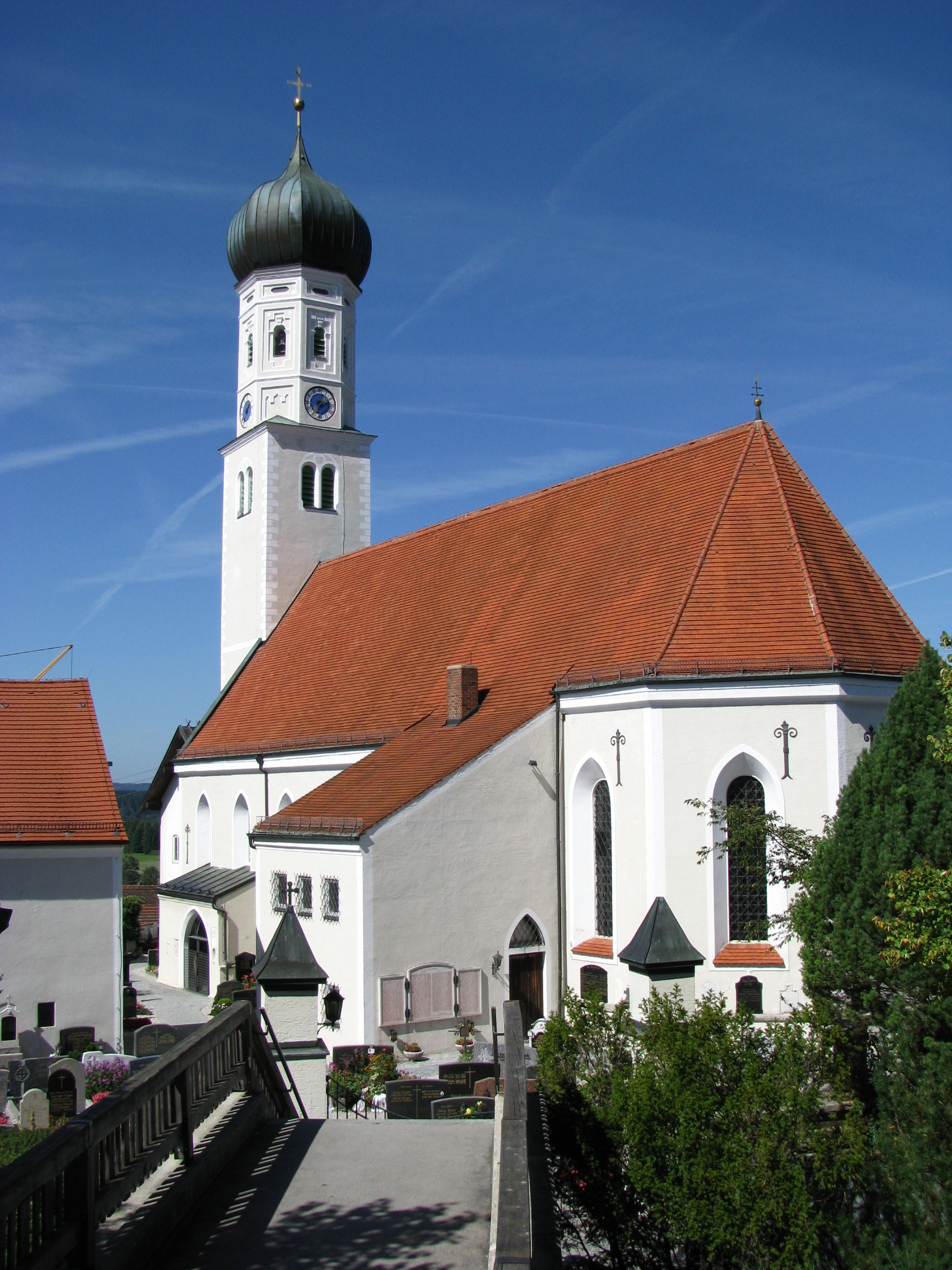 Katholische Pfarrkirche St. Laurentius in Königsdorf; spätgotisch, Ausbau im 17. Jahrhundert und 1785, Turm Ende 17. Jahrhundert von Caspar Feichtmayr.